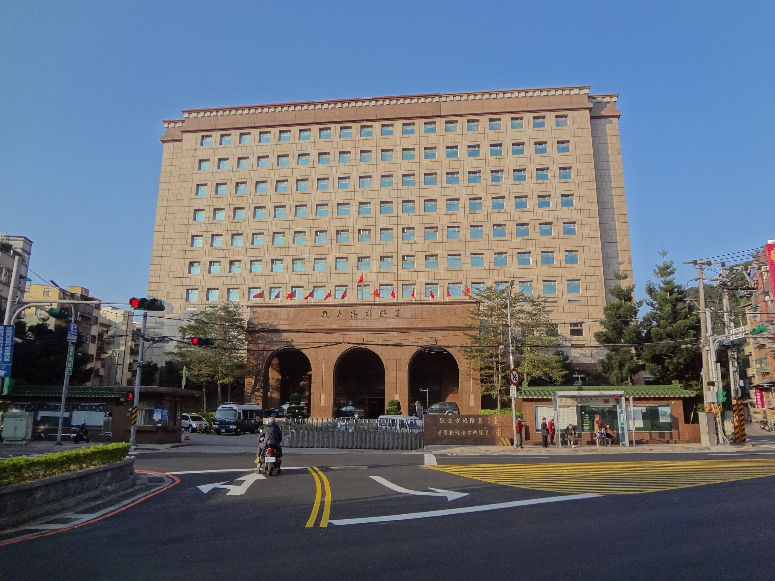 基隆司法大廈，位於基隆市信義區東信路176、178號，為臺灣基隆地方法院與臺灣基隆地方法院檢察署合署辦公地。